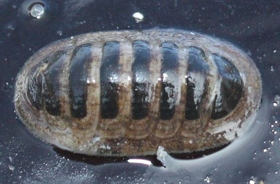 Leddsneglen Leptochiton asellus er norges vanligste.Template:Byline